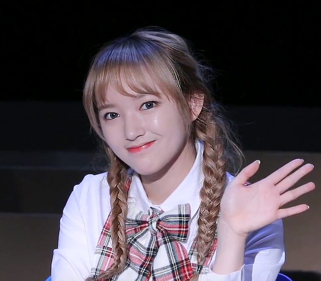 광주팬사인회 성소직찍